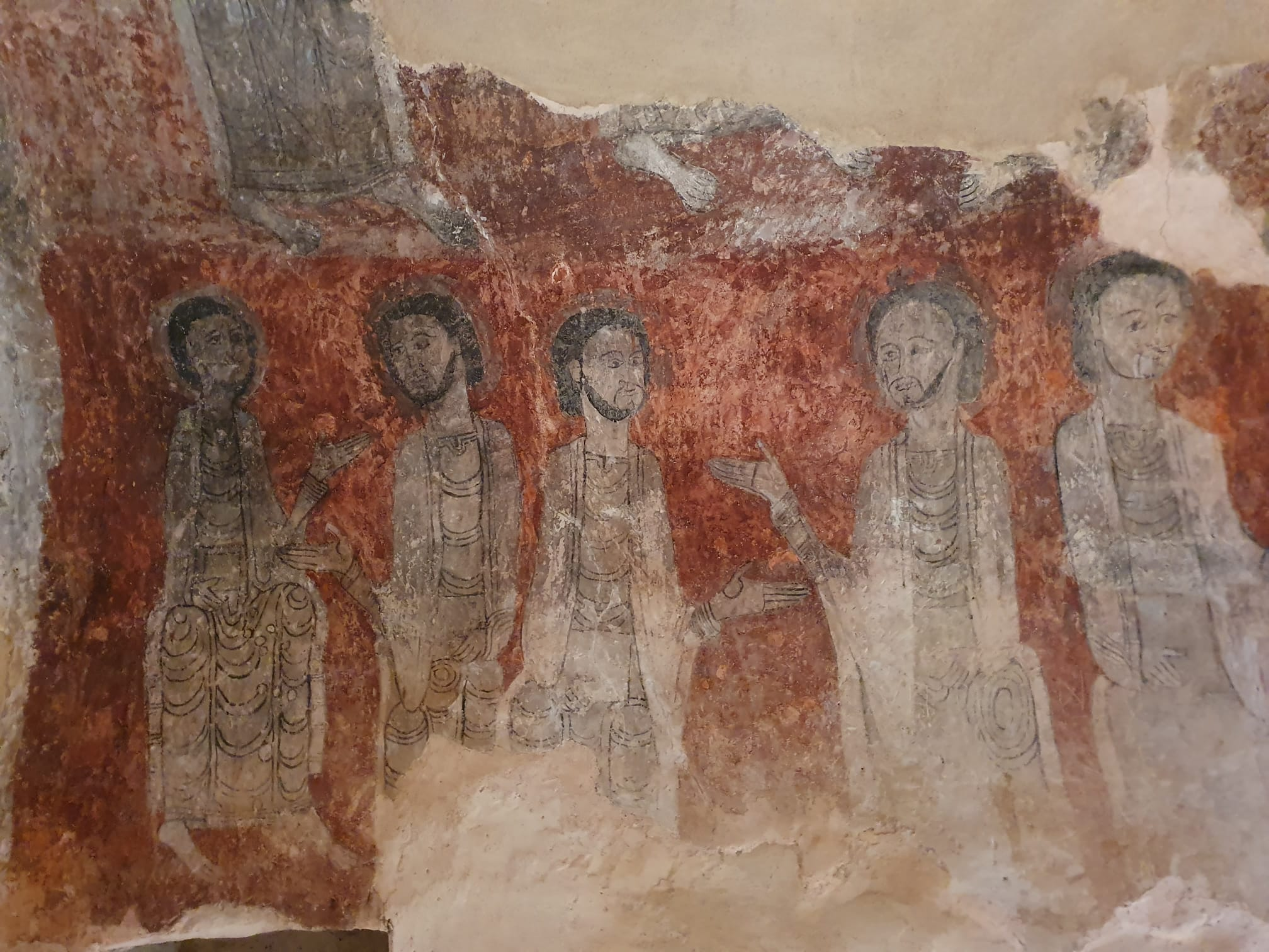 Pintura mural de la ermita San Esteban de Viguera, en Viguera, La Rioja, España. Datan del siglo XII, fecha en la que se reforma este antiguo templo visigótico. El tema que tratan son escenas del apocalipsis, esta en concreto muestra a cinco de los apóstoles